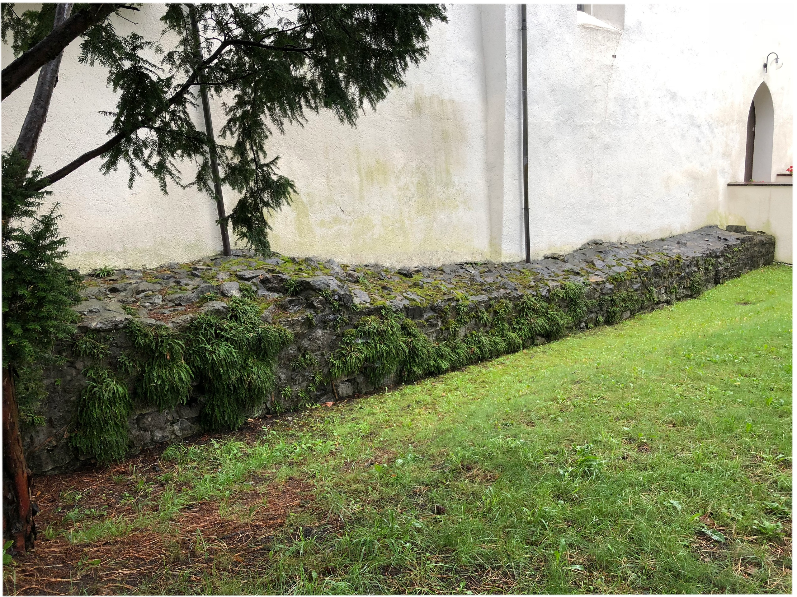 Konservierte Nordmauer des spätrömischen Kleinkastell an der St. Peter Kapelle in Schaan (Liechtenstein).